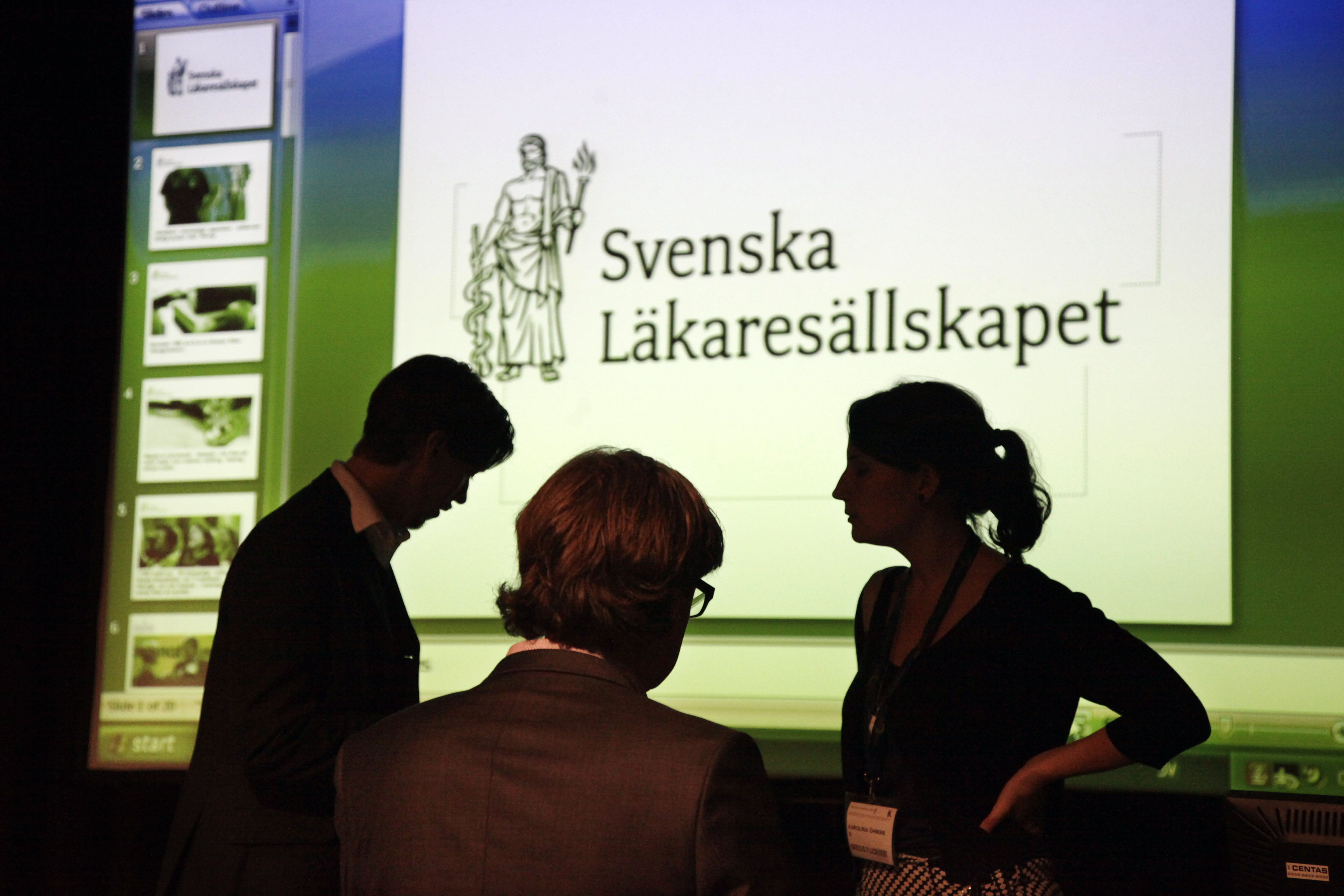 Kandidatföreningen